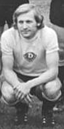 Title: Fußballmannschaft SG Dynamo Dresden Factual corrections and alternative descriptions are encouraged separately from the original description. Additionally errors can be reported at this page to inform the Bundesarchiv. Original historic description: ADN-ZB-Häßler-15.5.76-Dresden: SG Dynamo Dresden DDR-Fußballmeister 1976. Sie erkämpften den Meistertitel: (stehend von links) Hans-Jürgen Dörner, Klaus Lichtenberger, Udo Schmuck, Hans-Jürgen Kreische, Franz Ganzera, Hartmut Schade, Gerd Weber, Siegmar Wätzlich, Klaus Müller, (vorn von links) Christian Heim, Reinhard Häfner, Peter Kotte, Frank Richter, Torwart Klaus Boden, Rainer Sachse, Matthias Müller, Gert Heidler und Dieter Riedel.